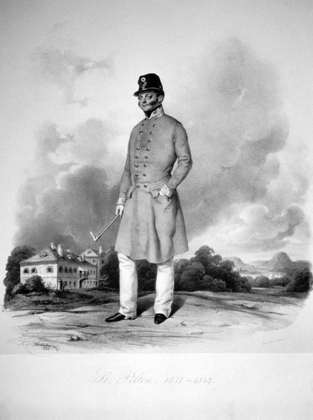 Franz Graf Gyulai (1798-1868), k. k. Feldzeugmeister, Kriegsminister, Vliessritter. Lithographie von Josef Kriehuber, 1843